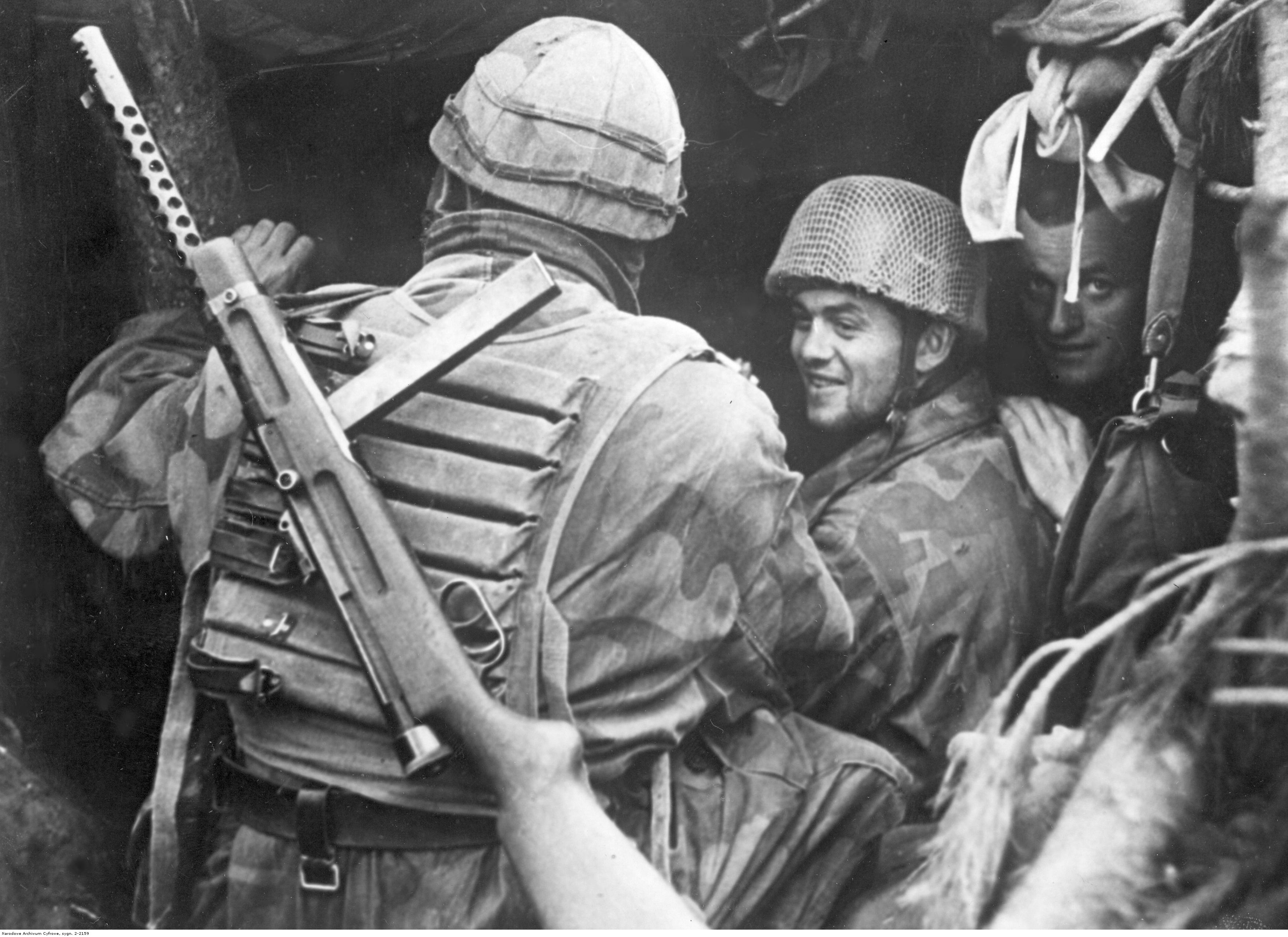 Niemieccy spadochroniarze z 1. FJD oraz włoscy spadochroniarze z dywizji "Folgore" na froncie pod Nettuno - Anzio. U włoskiego spadochroniarza widoczny na plecach pistolet maszynowy Beretta M1938.